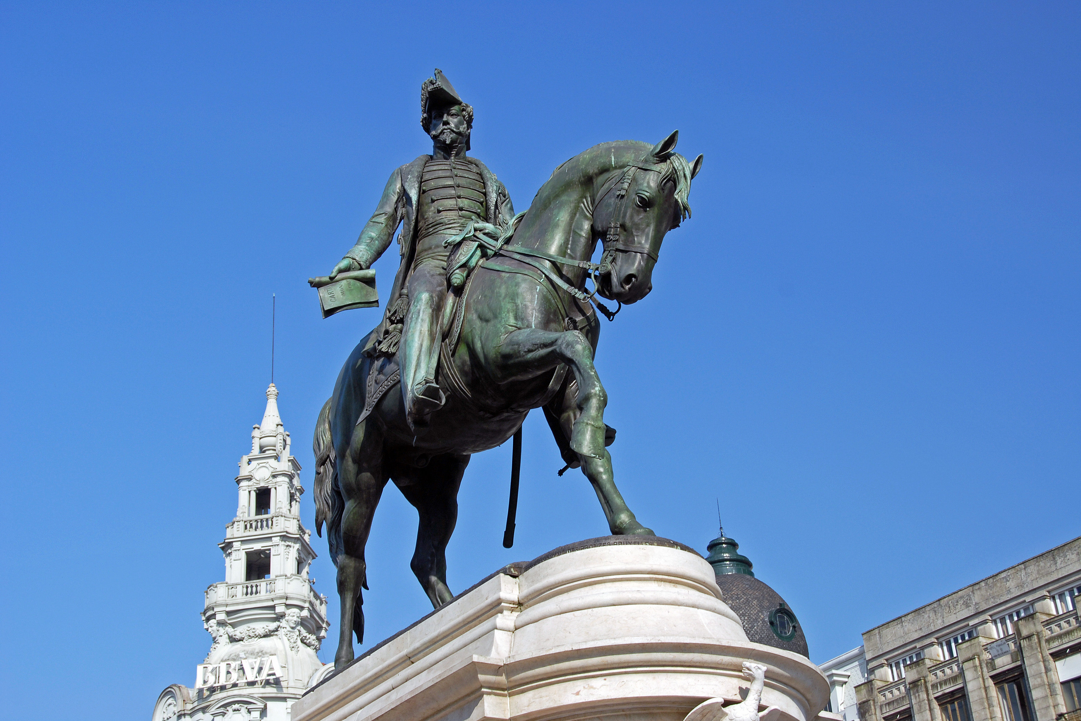 Estátua equestre de Dom Pedro IV This file was uploaded for Wiki Loves Monuments in Portugal with the unique identifier 73484.